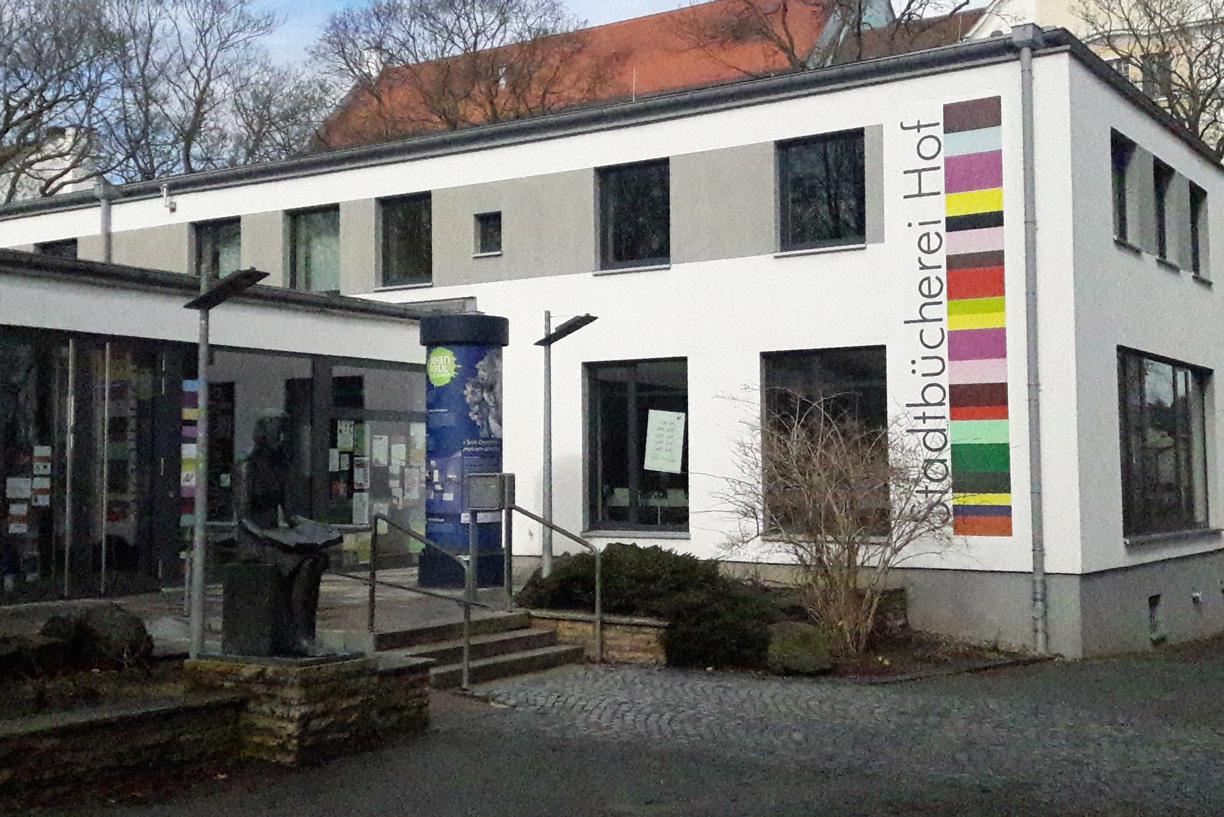 Hauptstelle der Stadtbücherei Hof im Wittelsbacher Park am Sophienberg